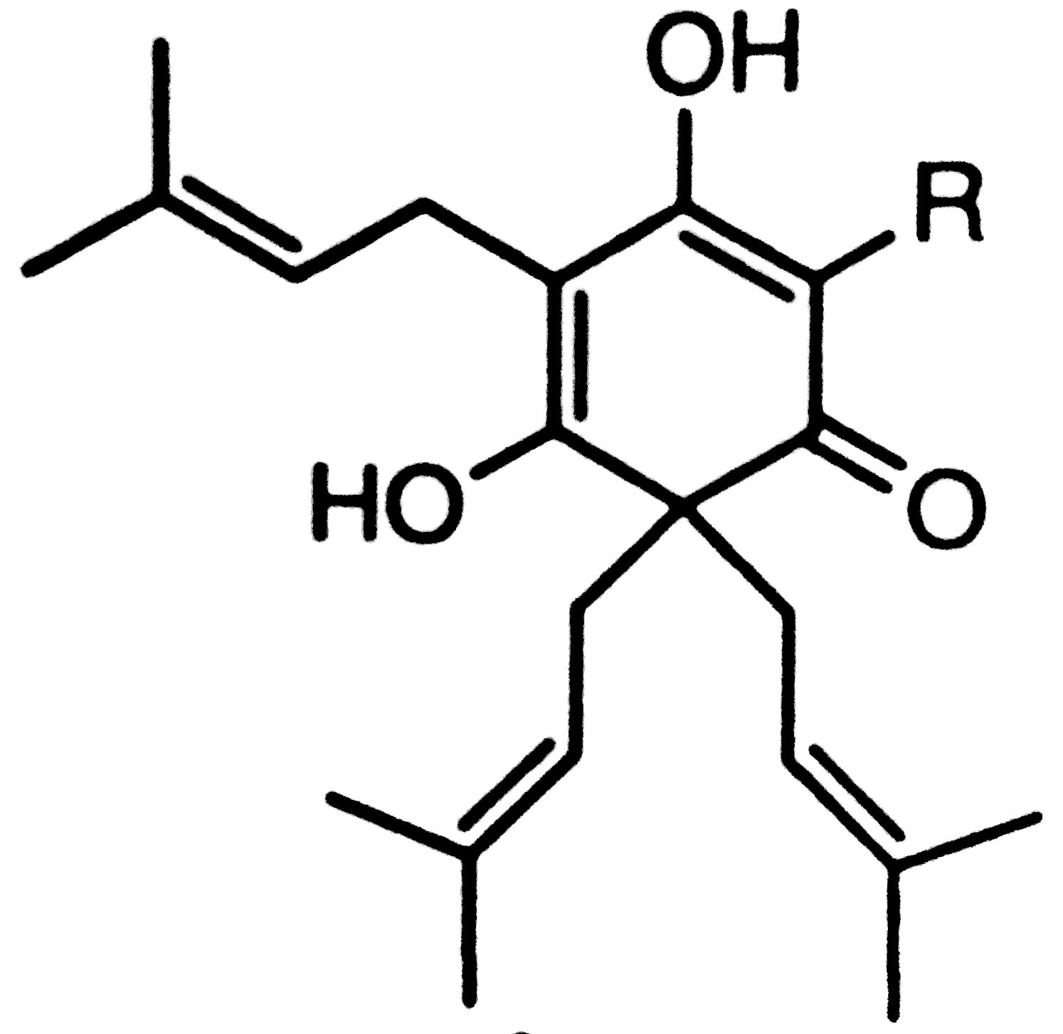 Grundstruktur for betasyrer (lupuloner)